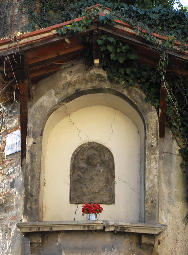 Villa Feri or Villa Malvolta, Florence, Italy. Corner via Martellini/via del Podestà: Tabernacle.